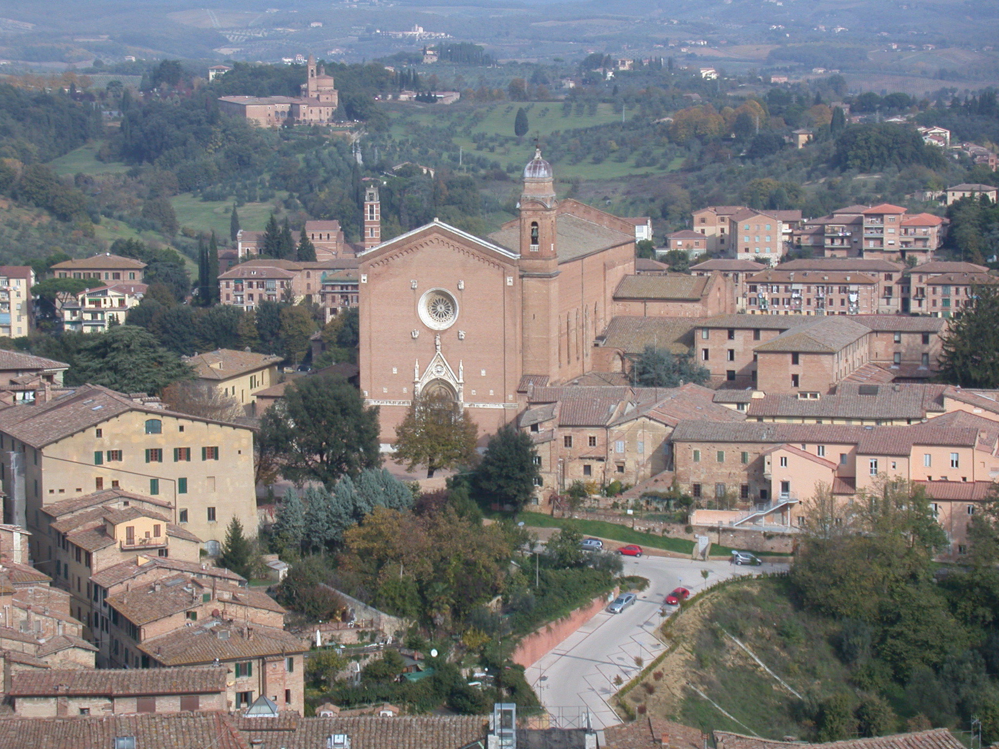 Italia, Siena, chiesa di San Francesco, vista dalla Torre del Mangia